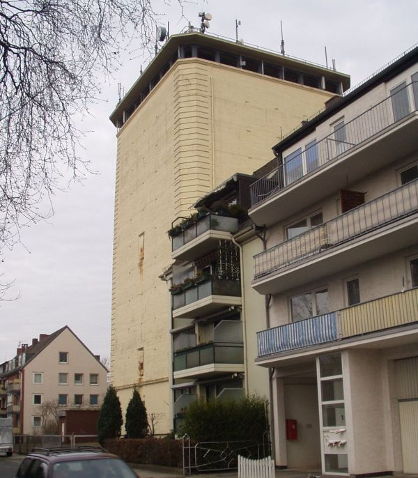 Hochbunker, mitten in einer Wohnsiedlung gelegen (Bremen-Gröpelingen)